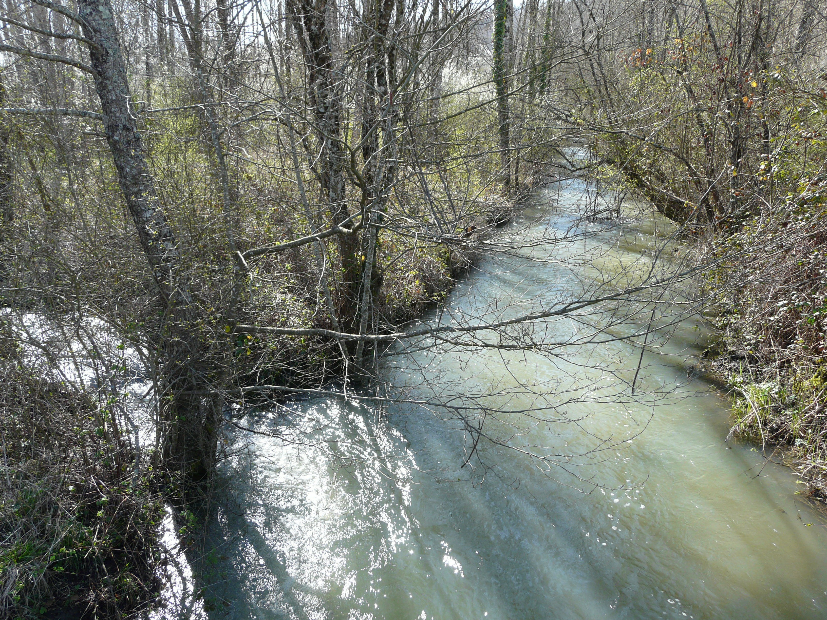 Le Manoire vu vers l'amont près du moulin de Capelot, Sainte-Marie-de-Chignac, Dordogne, France.